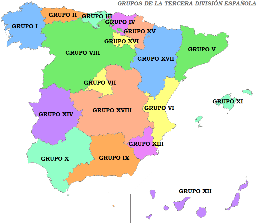 Grupos de la Tercera División Española de Fútbol: Grupo I: Galicia Grupo II: Asturias Grupo III: Cantabria Grupo IV: Comunidad Vasca Grupo V: Cataluña Grupo VI: Comunidad Valenciana Grupo VII: Comunidad de Madrid Grupo VIII: Castilla y León Grupo IX: Andalucía Oriental y Melilla Grupo X: Andalucía Occidental y Ceuta Grupo XI: Islas Baleares Grupo XII: Canarias Grupo XIII: Región de Murcia Grupo XIV: Extremadura Grupo XV: Navarra Grupo XVI: La Rioja Grupo XVII: Aragón Grupo XVIII: Castilla-La Mancha